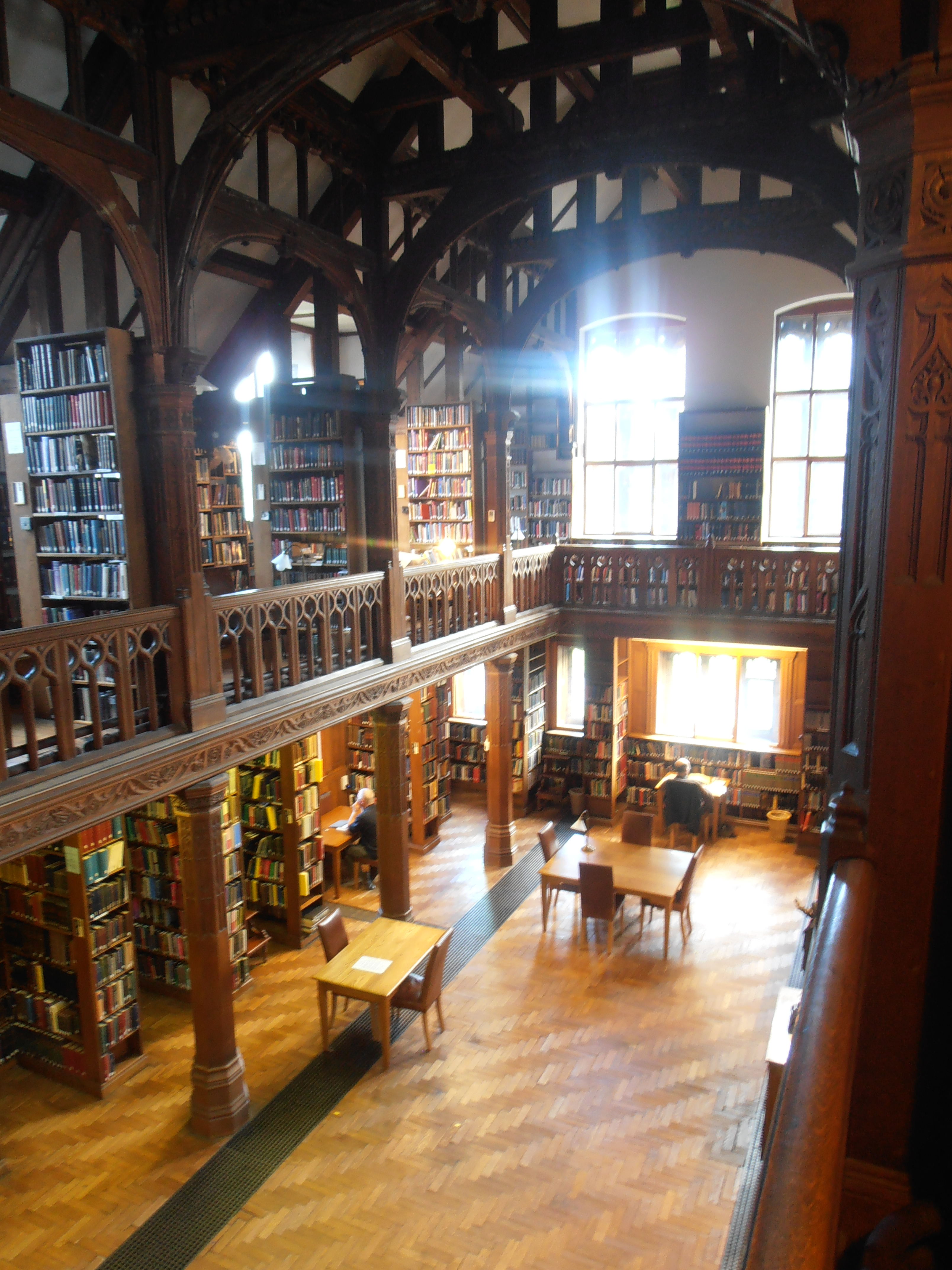 Llyfrgell Sant Deiniol / Llyfgell Gladstone, Penarlâg, Sir y Fflint.